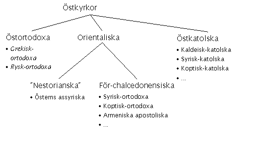 En schematisk beskrivning av de olika kategorierna av östkyrkor.